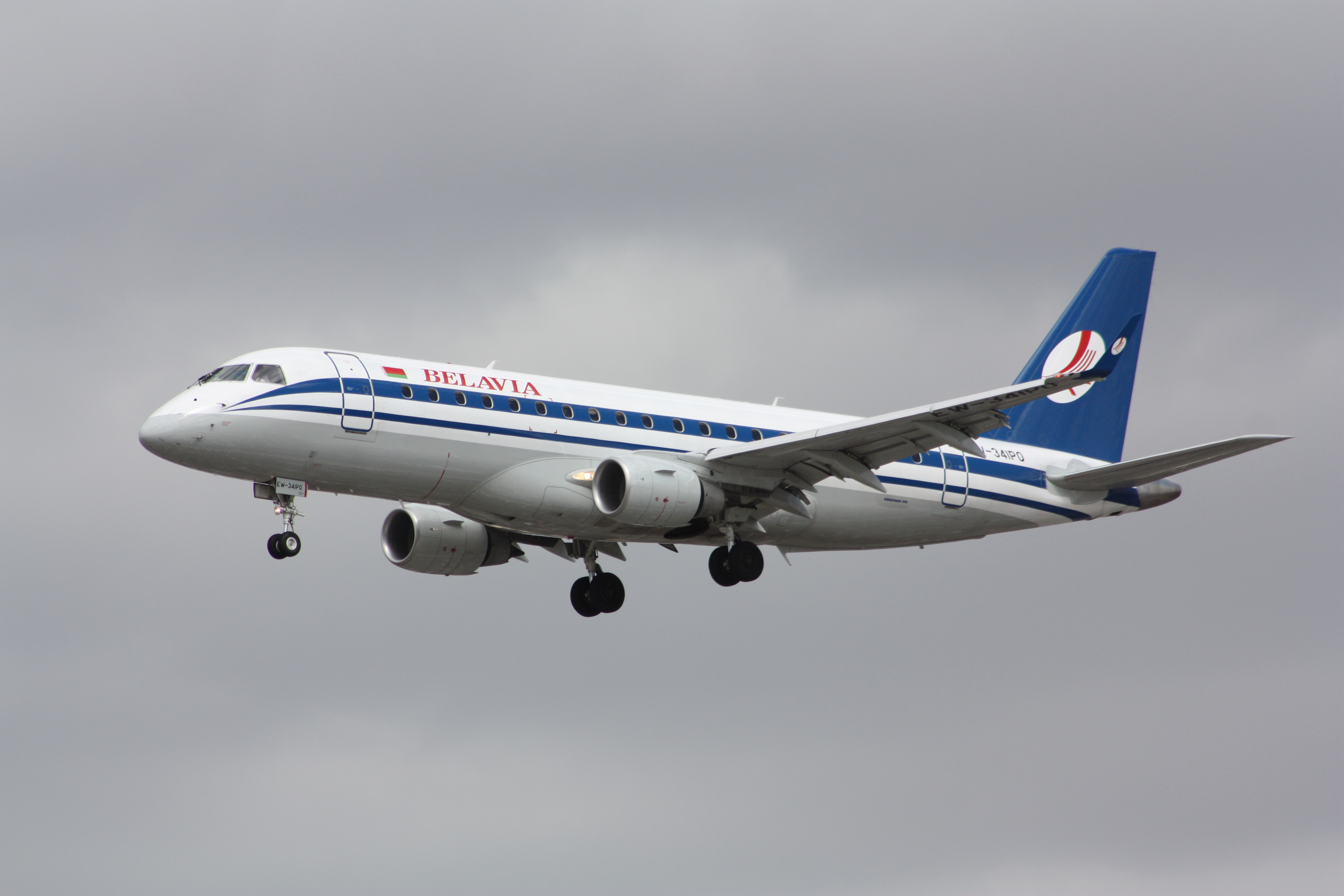 Embraer EMB-175 - EW-341PO